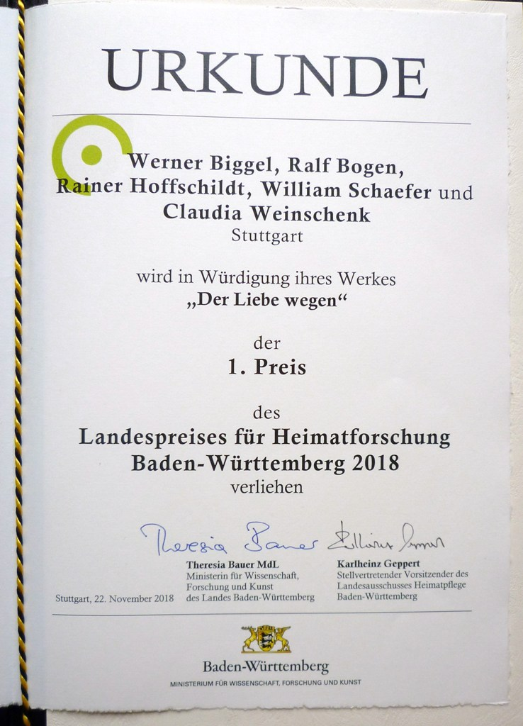 Foto der Urkunde des Landespreises für Heimatforschung Baden-Württemberg 2018, verliehen an Werner Biggel, Ralf Bogen, Rainer Hoffschildt, William Schaefer und Claudia Weinschenk, denen in Würdigung ihres gemeinsamen Werkes „Der Liebe wegen“ der 1. Preis des Landespreises für Heimatforschung Baden-Württemberg 2018 verliehen wurde. Die Urkunde trägt die originalen Unterschriften der Ministerin für Wissenschaft, Forschung und Kunst des Landes Baden-Württemberg, Theresia Bauer, sowie des stellvertretenden Vorsitzenden des Landesausschusses Heimatpflege Baden-Württemberg, Karlheinz Geppert.